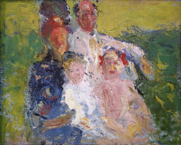 Schönberg Familylabel QS:Lde,"Die Familie Schönberg"label QS:Len,"Schönberg Family"